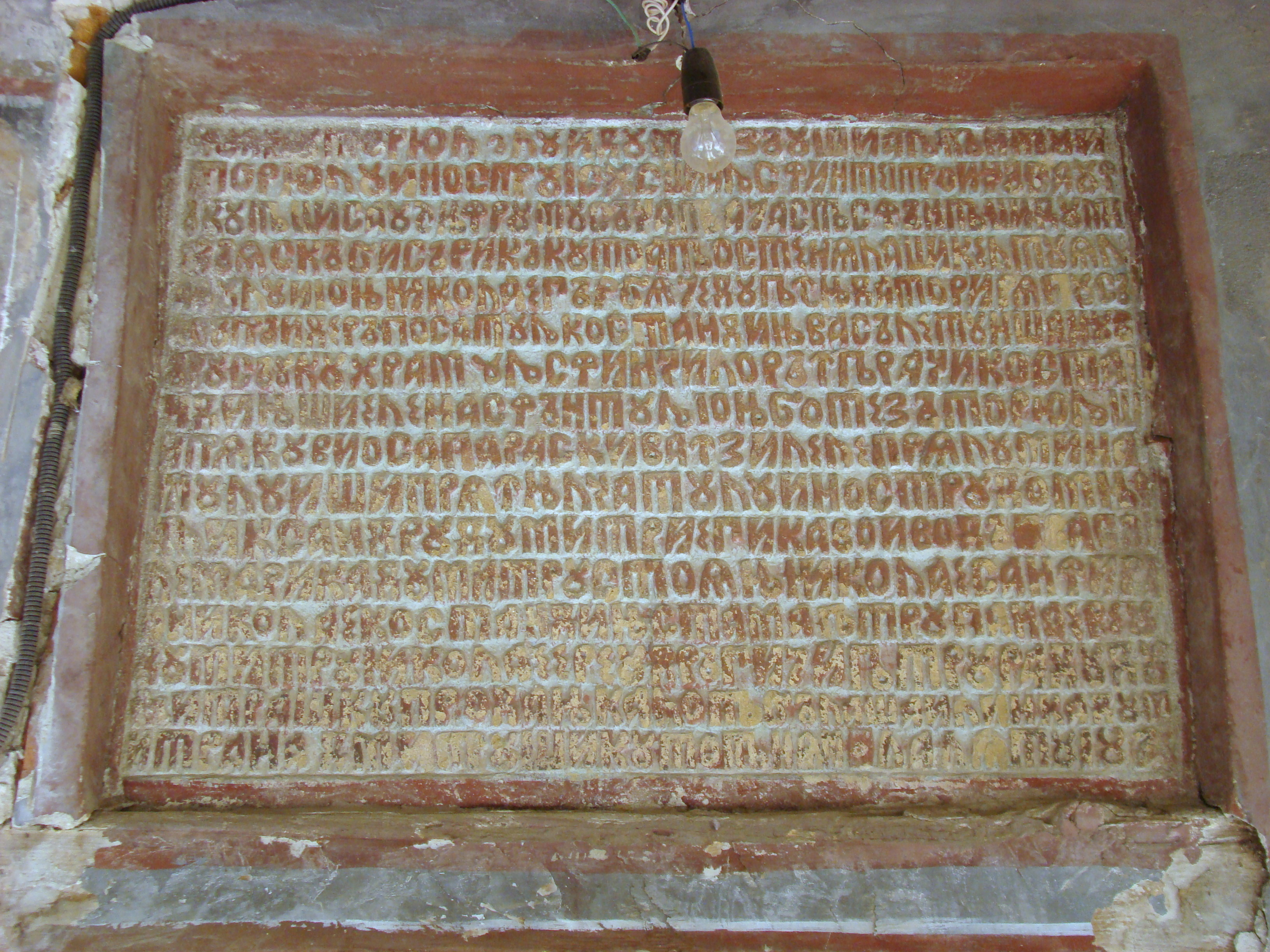 Biserica „Cuvioasa Paraschiva”, sat Vladimir; comuna Vladimir